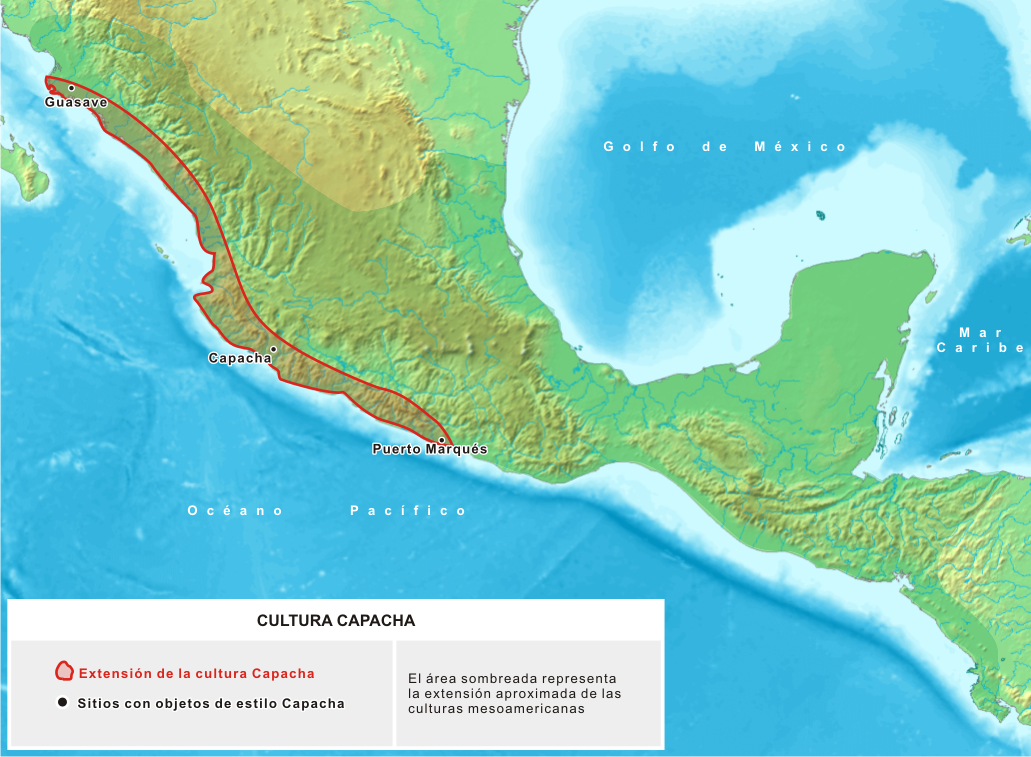 Extensión aproximada de los pueblos mesoamericanos que produjeron cerámica de estilo Capacha, en el Período Preclásico.